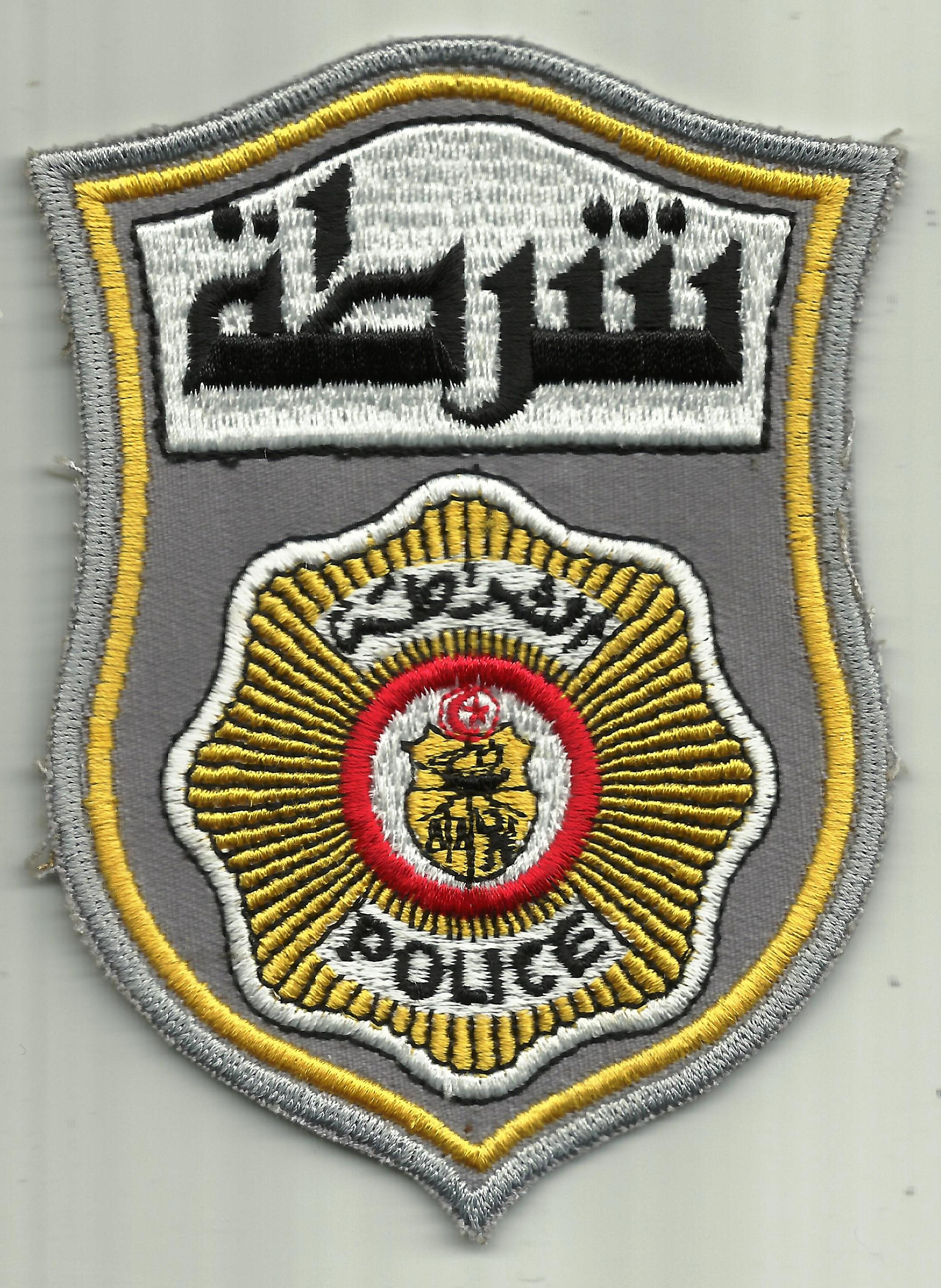 politie embleem Tunesië